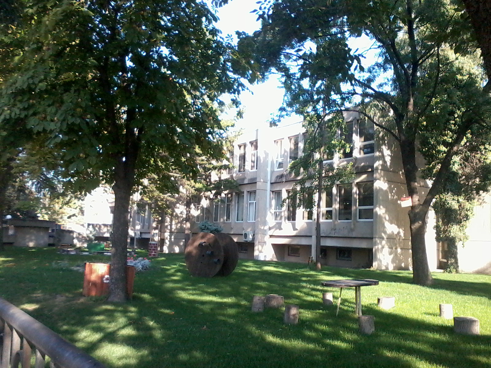 picture made by mobile Skopje. R of Macedonia , Скопје/Скопље Р.Македонија ( СУ на ГРАД СКОПЈЕ "НИКОЛА КАРЕВ" )